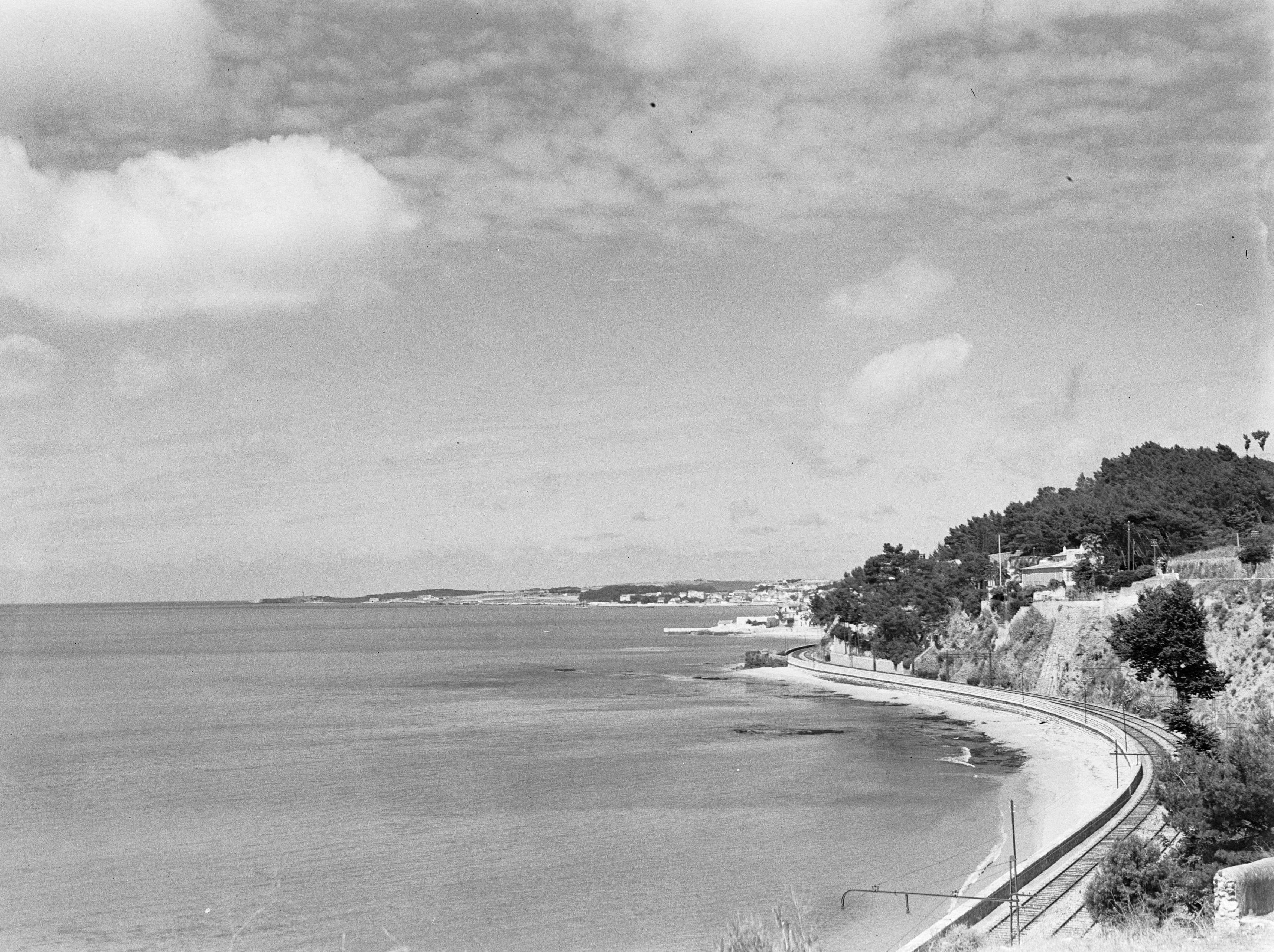 Collectie / Archief : Fotocollectie Van de Poll Reportage / Serie : Zeereis met MS Baloeran Beschrijving : Blik op de zee vanuit de weg van Lissabon naar Cascais [locatie Jamor-Caxias, waar de spoorlijn langs de kustlijn loopt] Annotatie : Deze foto maakt deel uit van een serie foto's van een reis met de MS Baloeran van de Rotterdamse Lloyd Datum : mei 1935 Locatie : Estoril, Portugal Trefwoorden : kusten, wegen Fotograaf : Poll, Willem van de Auteursrechthebbende : Nationaal Archief Materiaalsoort : Glasnegatief Nummer archiefinventaris : bekijk toegang 2.24.14.02 Bestanddeelnummer : 191-0212